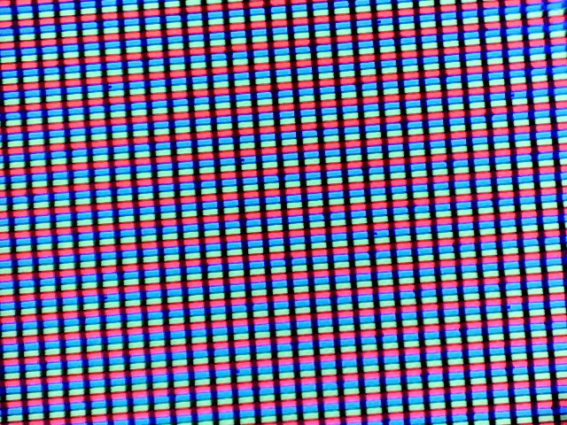 Pantalla de teléfono celular observada con un microscopio electrónico